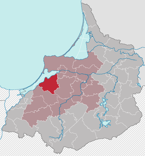 Lage des Landkreises Heilsberg in Ostpreußen